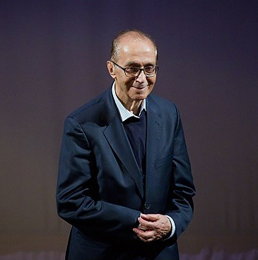 امیراشرف آریانپور - اختتامیه بیست و هشتمین جشنواره موسیقی فجر ۲ اسفند ۱۳۹۱